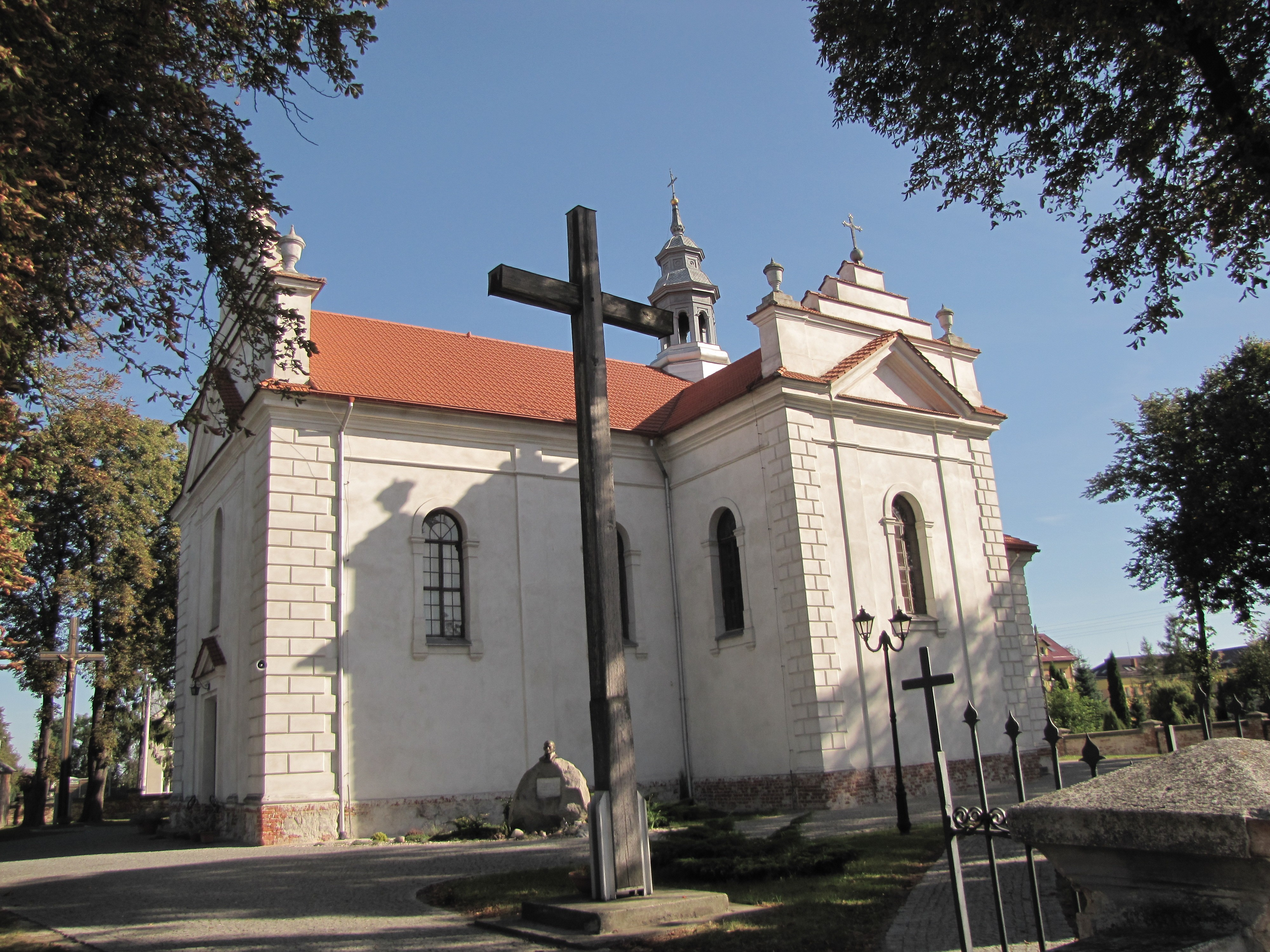 Kąkolewnica - kościół parafialny p.w. św. Filipa Nereusza, mur., 1870 (zabytek nr rejestr. A-278 z 17.08.1997)